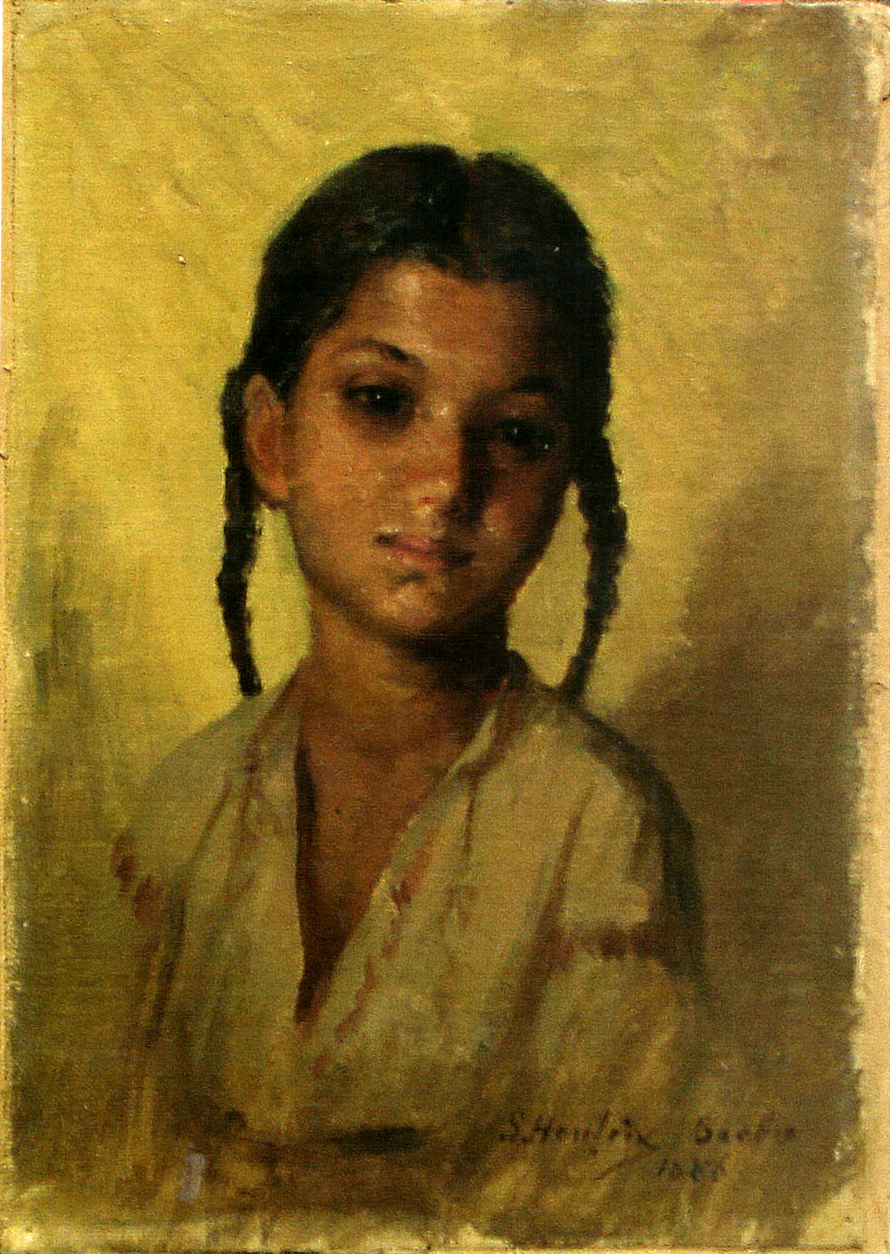 Sava Henţia (1848 - 1904) - Ţărăncuţa, Muzeul Municipiului Bucureşti, ulei/pânză lipită pe carton, 27,4x18.7cm, semnat dreapta jos cu brun închis S.Henția, datat dreapta jos cu brun 1866, inv. 1223, Muzeul Municipiului București / Secția de artă -- Portret de fetiţă, bust, văzut frontal, capul uşor înclinat spre dreapta cadrului, părul negru împletit în două codiţe subţiri. Îmbrăcată într-o ie albă, brodată cu arnici roşu şi deschisă la gât. Fondul, în partea superioară, este galben crom grizat. Realizarea plastică spontană, în tuşe rapide şi sigure. Portret psihologic de o rafinată plasticitate, cu mijloace cromatice reduse. Semnat dreapta jos, cu brun închis "S. Henţia".